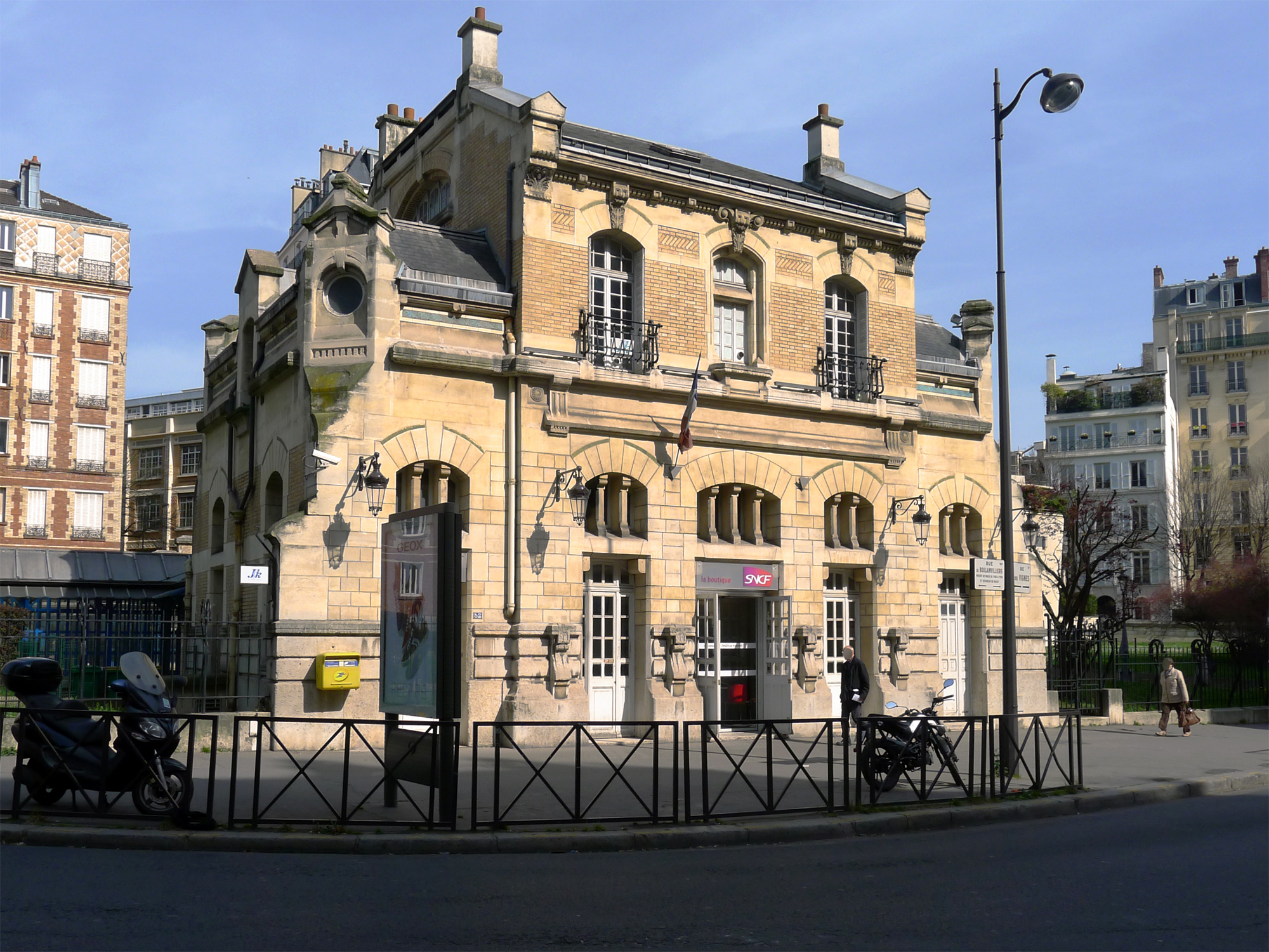 Gare de Boulainvilliers (52, rue des Vignes, Paris XVI)